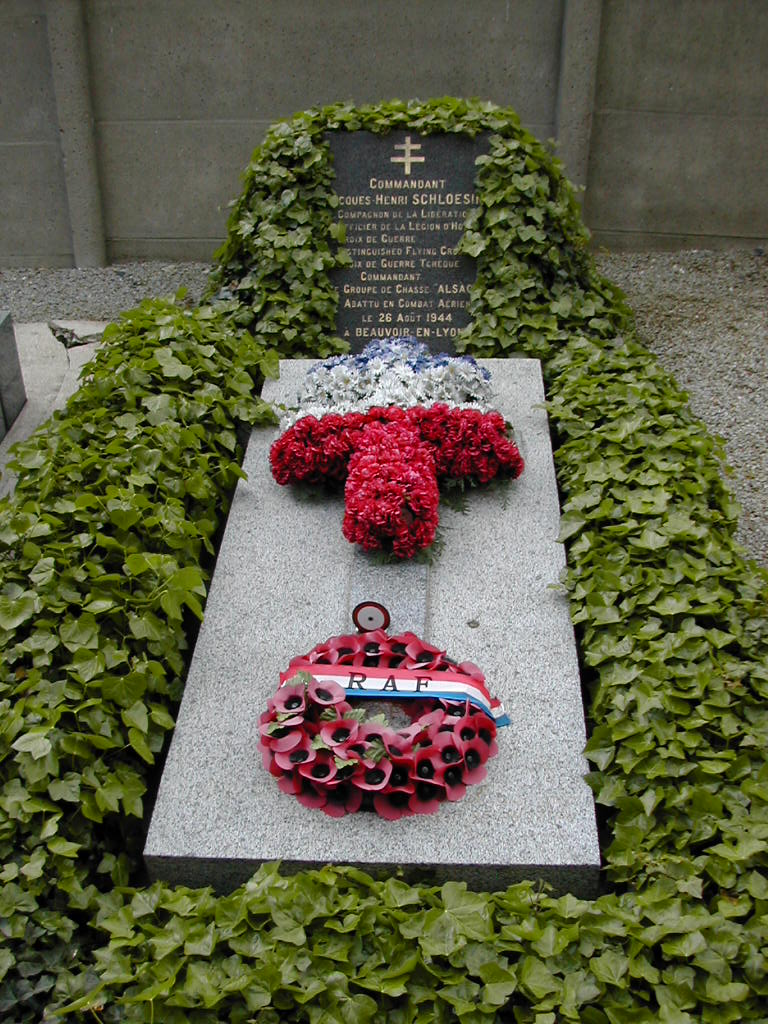 Tombe de J-H Schloesing a Beauvoir en Lyons.